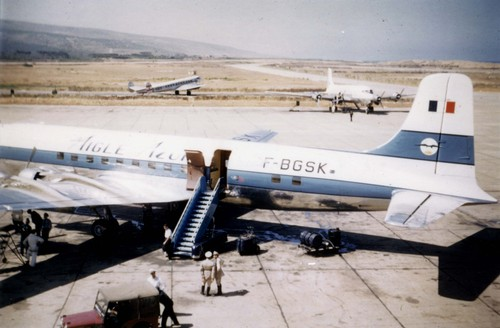 DC-6B F-BGSK à Beyrouth le 13 juin 1954